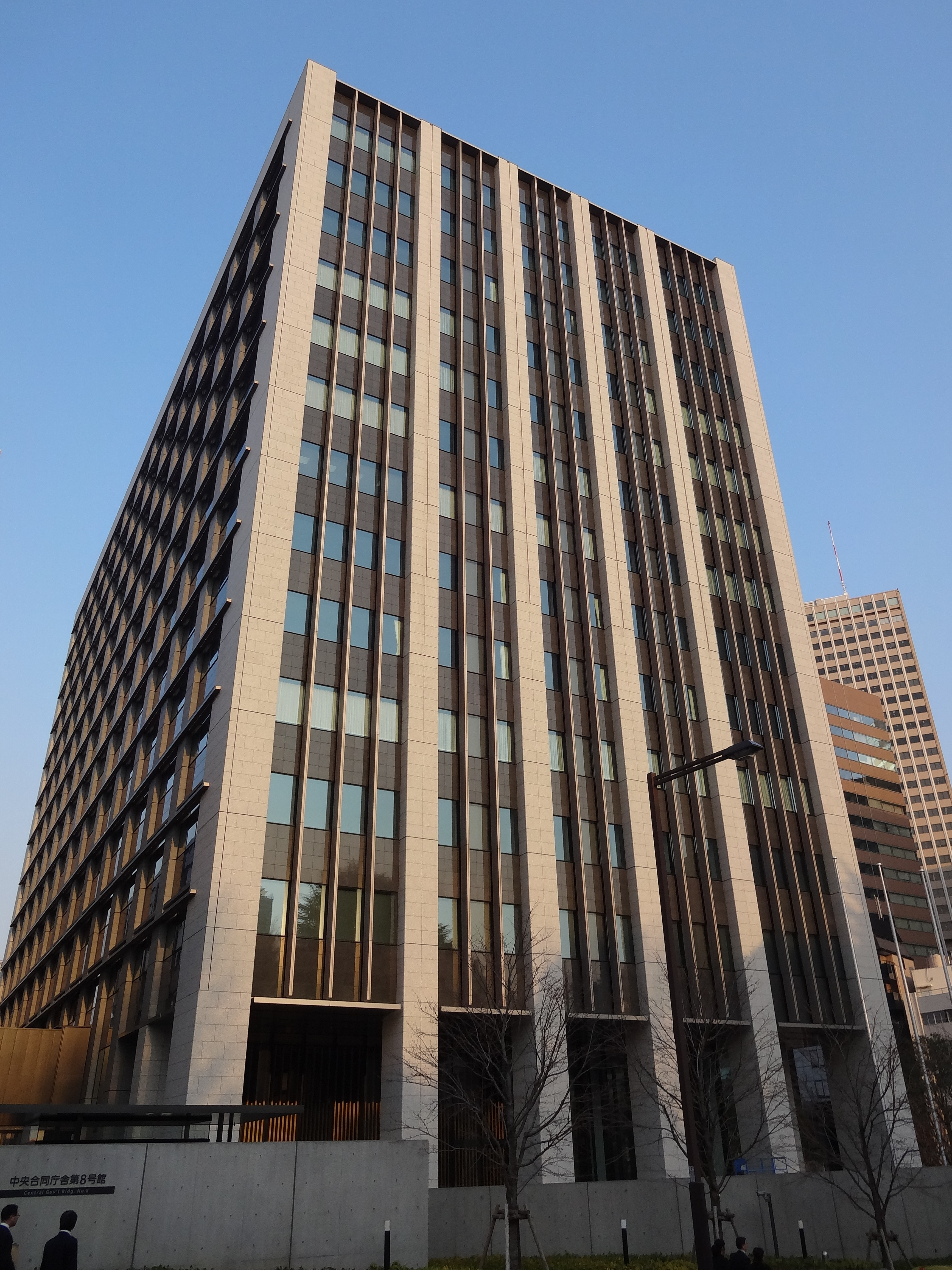 中央合同庁舎第8号館の外観。